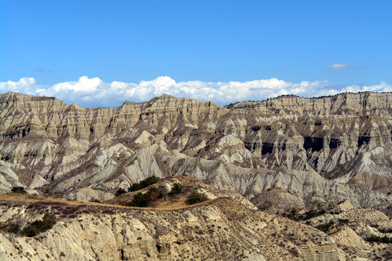 Vashlovani State Reserve